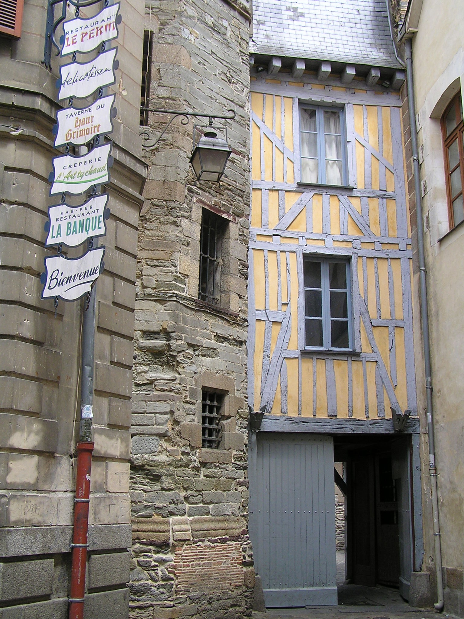 la prison médiévale à Rennes